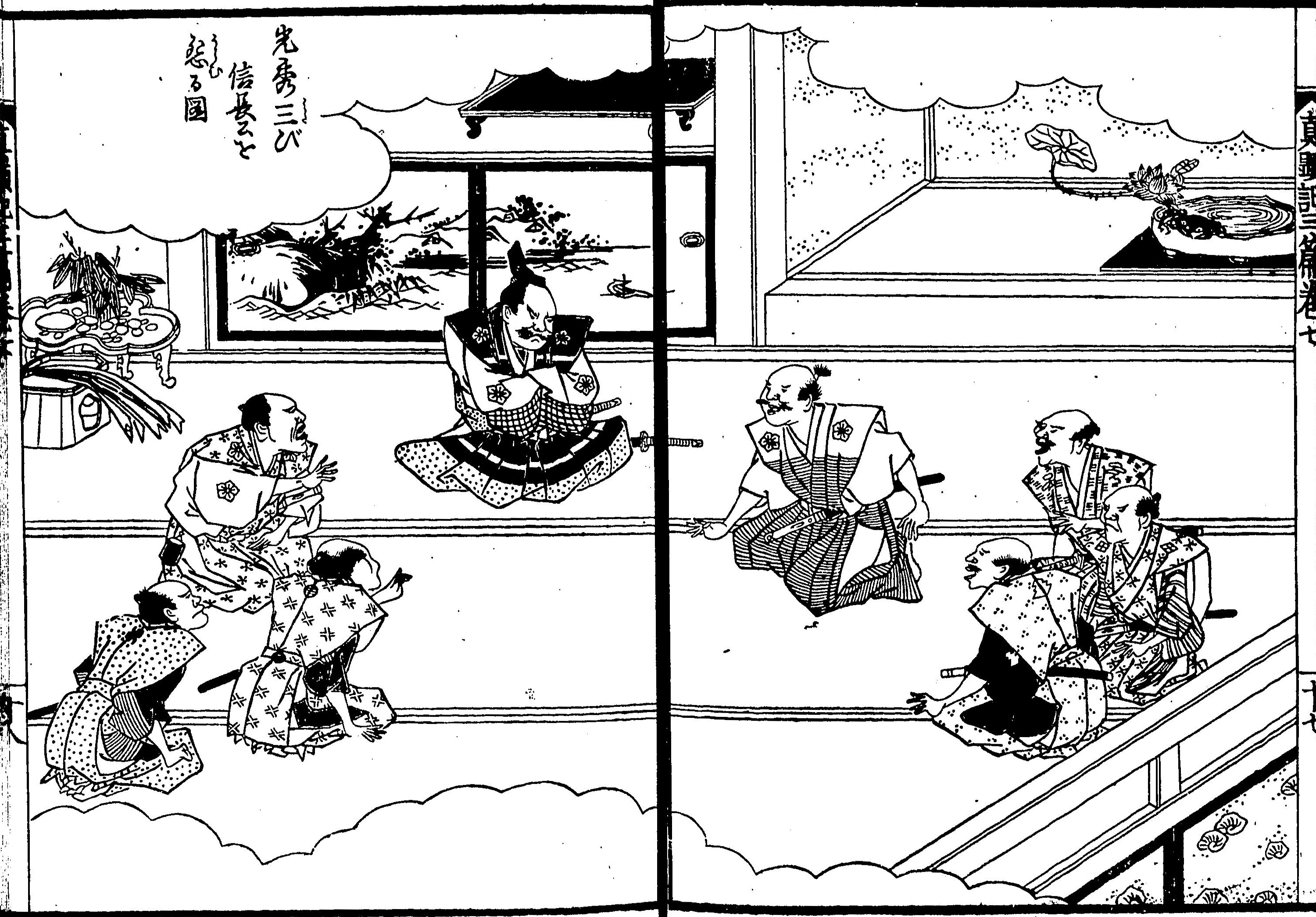 『絵本太閤記』の一場面。（絵：岡田玉山） 「光秀三度信長公恨むる図」